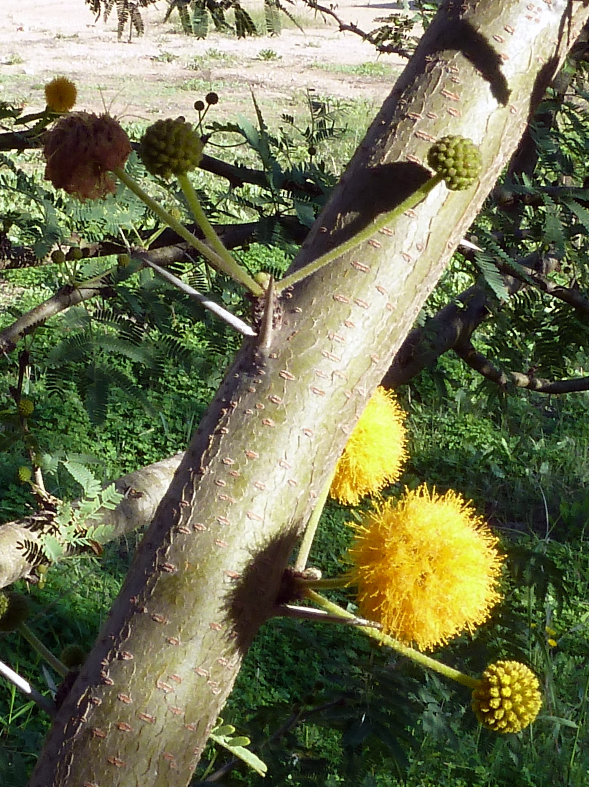 Vachellia farnesiana (Espinillo blanco) - Detalle del tronco con lenticelas - Final de la Calle de la Paz, ornamental, Albatera (Alicante, España).